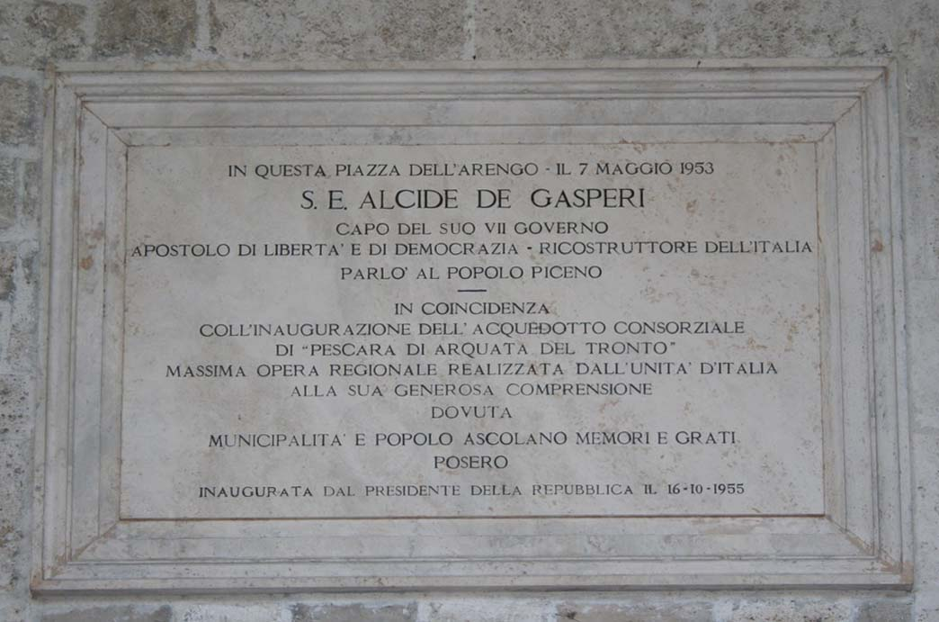 Lapide commemorativa in marmo collocata sulla facciata esterna del palazzo dell'Arengo di Ascoli Piceno, in memoria dell'inaugurazione dell'acquedotto consorziale di Pescara di Arquata del Tronto avvenuta alla presenza del presidente della Repubblica Italiana Giovanni Gronchi il 16 ottobre 1955.